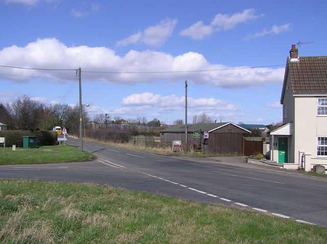 Dalton Gates